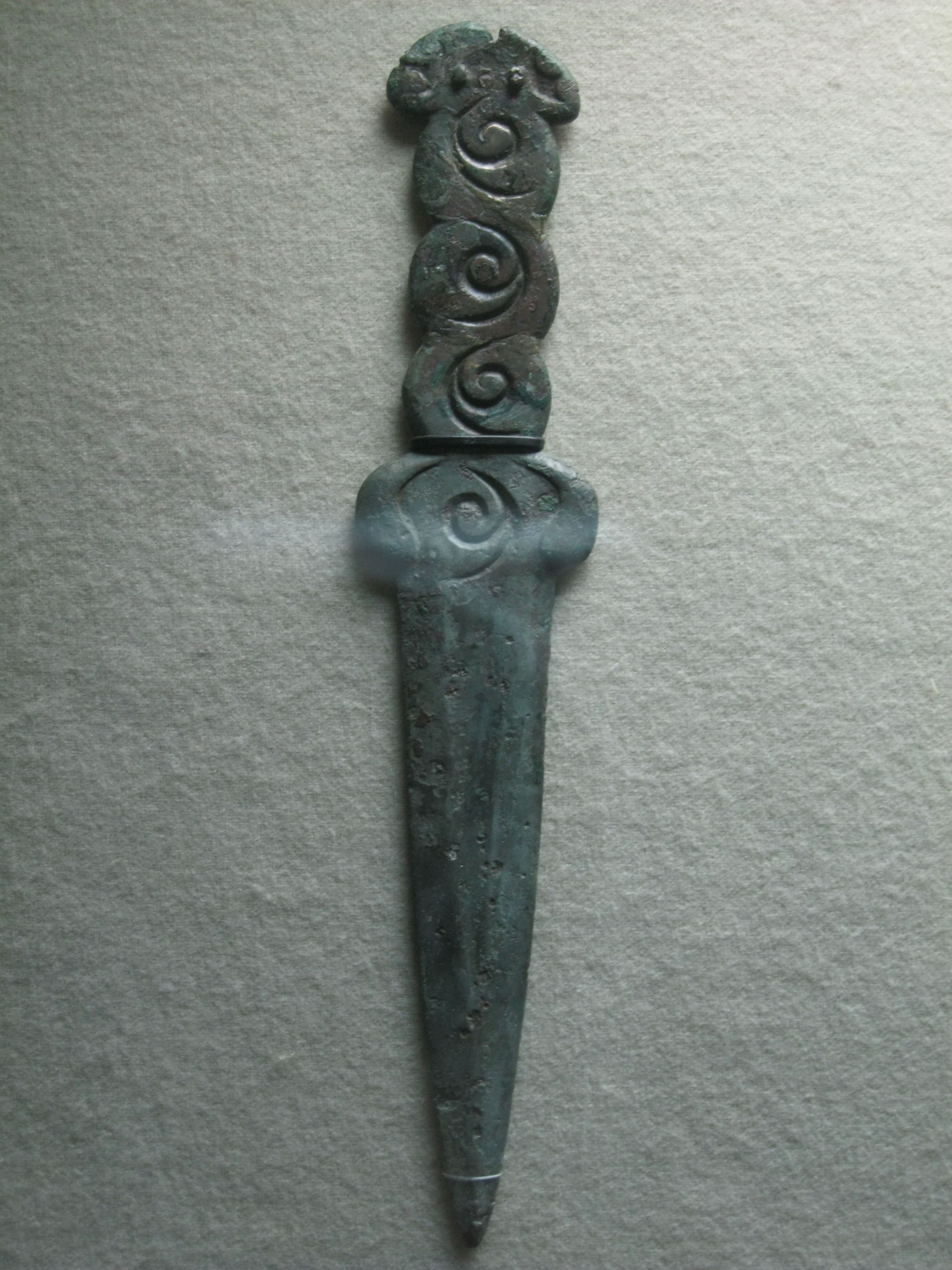 Кинжал. Бронза. Ананьинская культура. V в. до н. э. Национальный музей Республики Татарстан